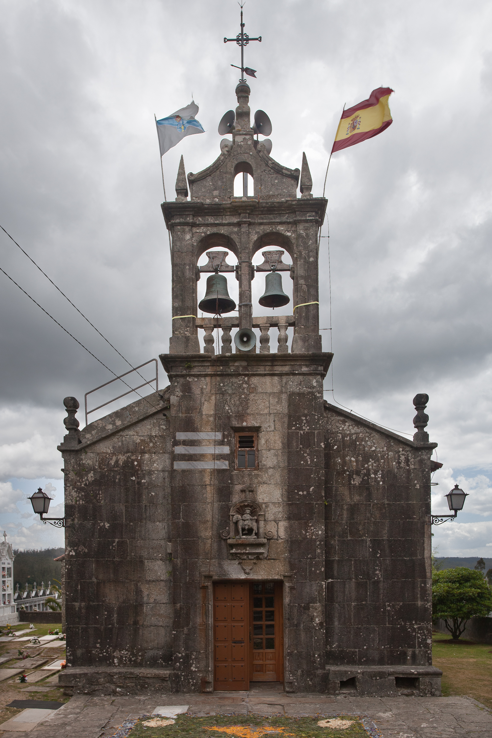 Igrexa de San Martiño de Fontecada, Santa Comba, Galiza, España